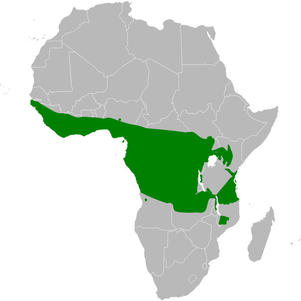 Eurillas distribution map